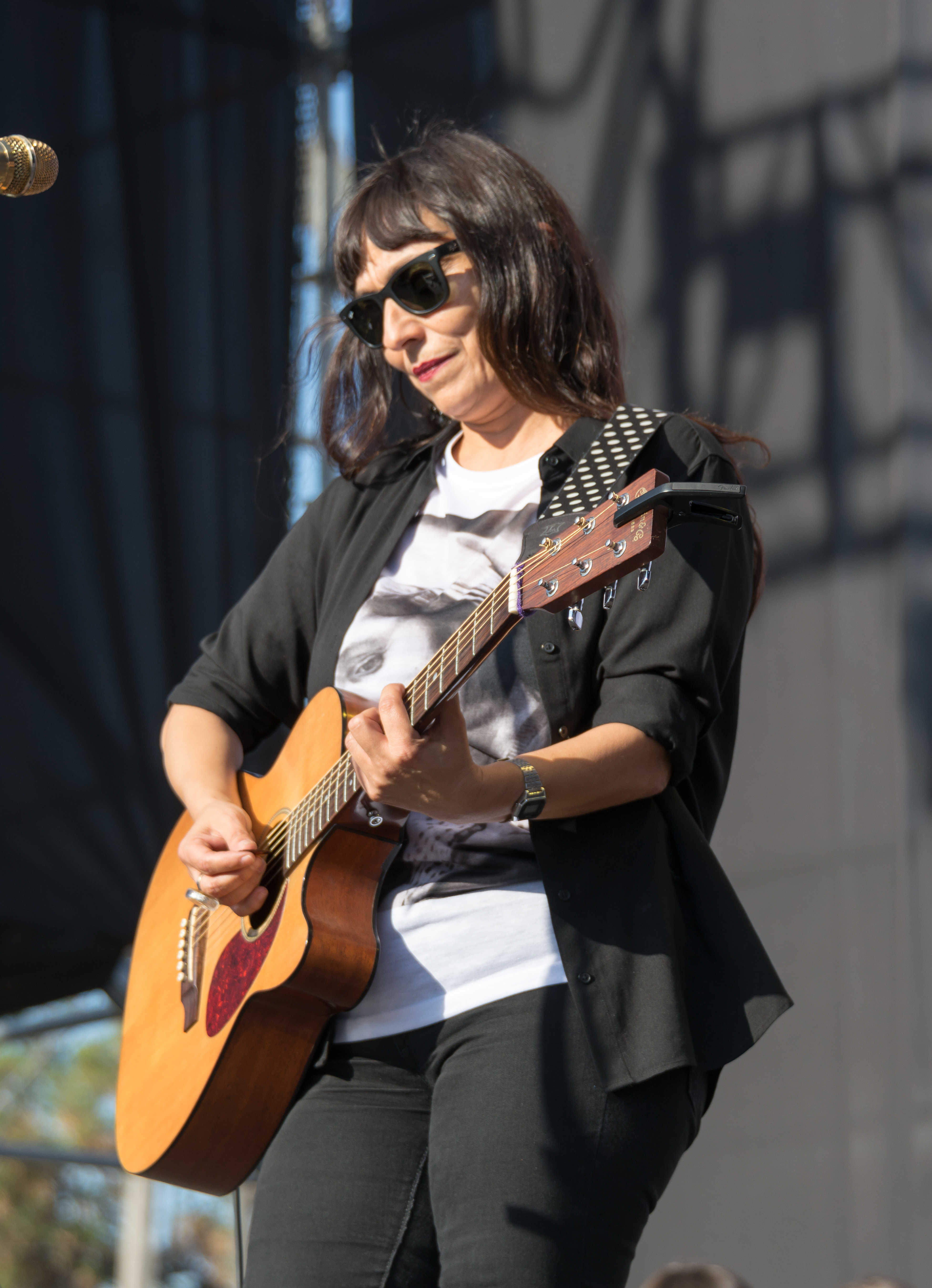 Javiera Parra, Día de la música chilena 2019, Velódromo del Estadio Nacional, Ñuñoa, Santiago, Chile.